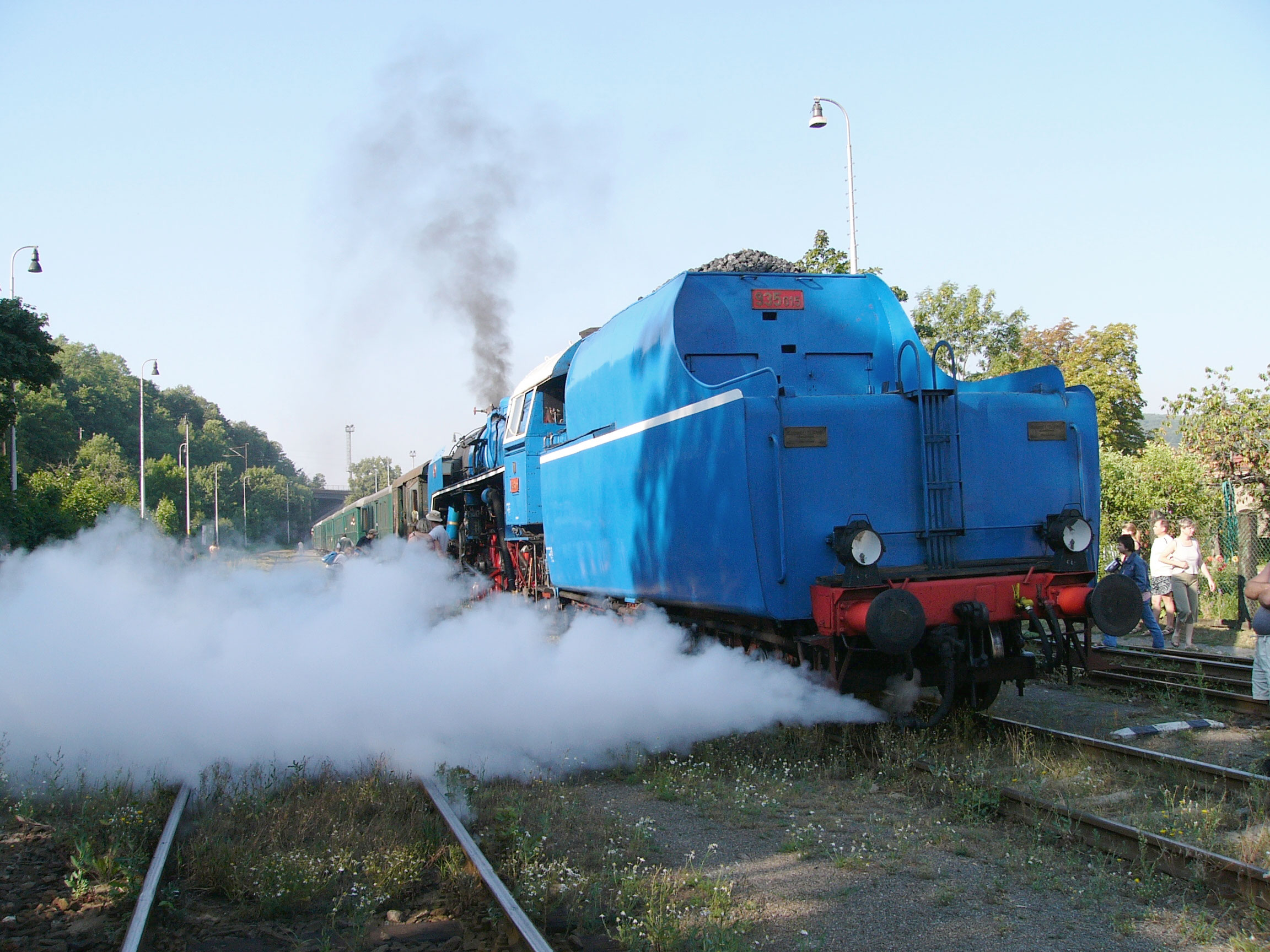 Lokomotiva Albatros 498.0